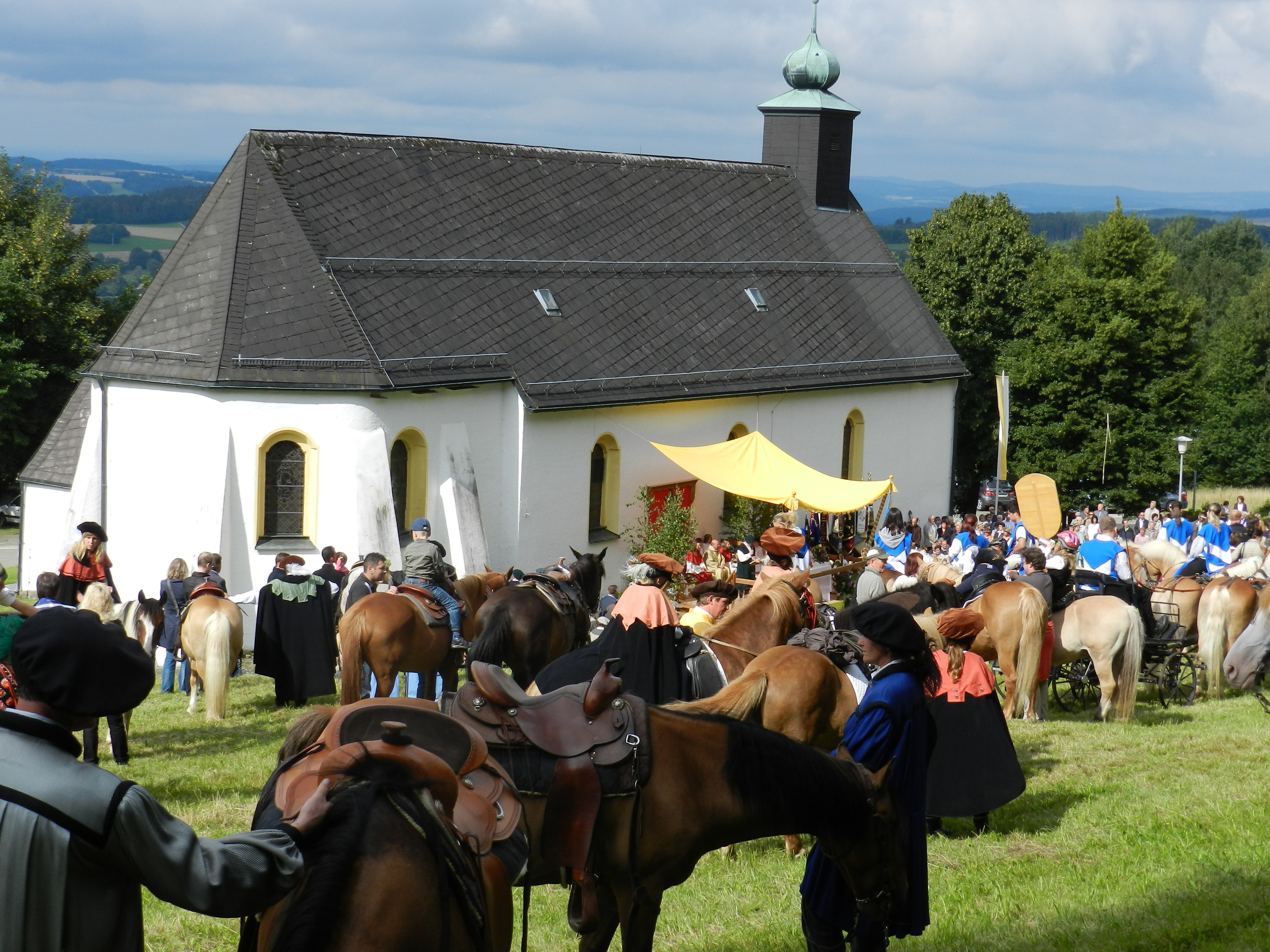 St. Jodokritt in Tännesberg - Kirche St. Jodok mit Reitern, Gottesdienst vor der Wallfahrtskirche (24. Juli 2011)